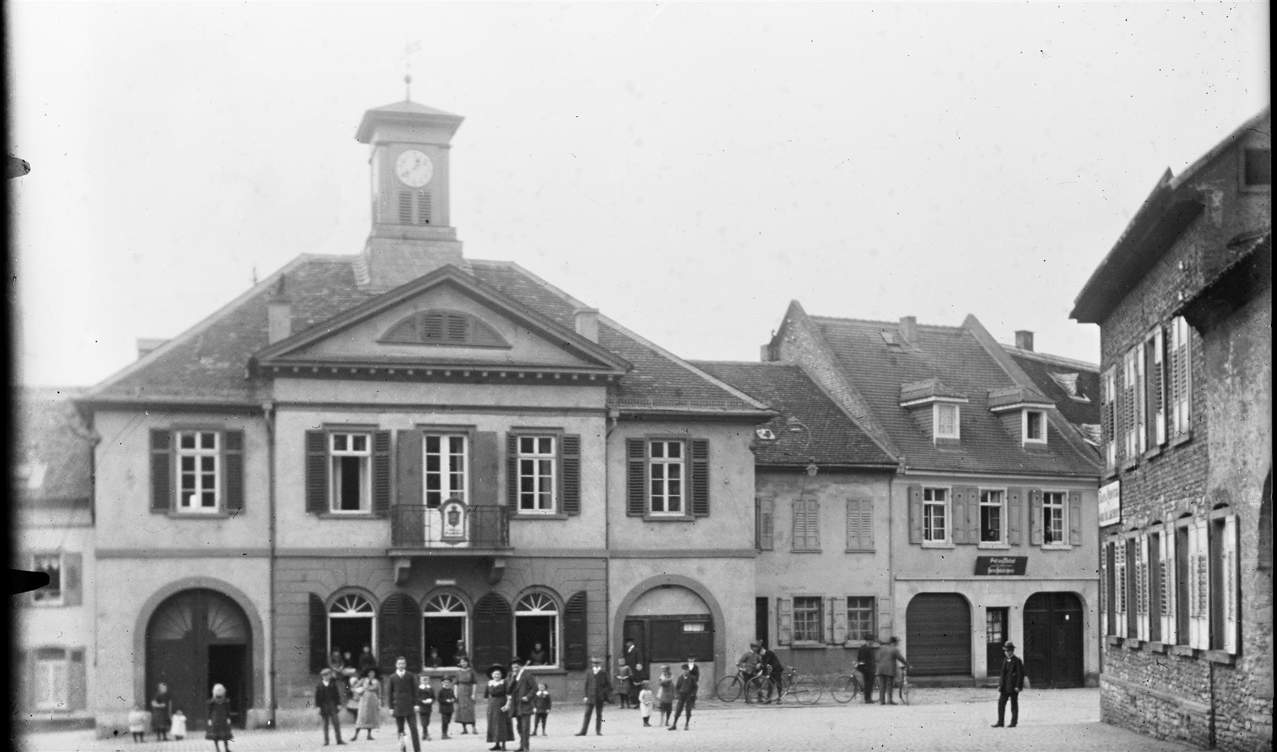 Original Zitiertext: Ansicht des Marktplatzes; o. D. (Alte Aufnahme des Rathauses am Marktplatz in Ober-Ingelheim um die Jahrhundertwende)